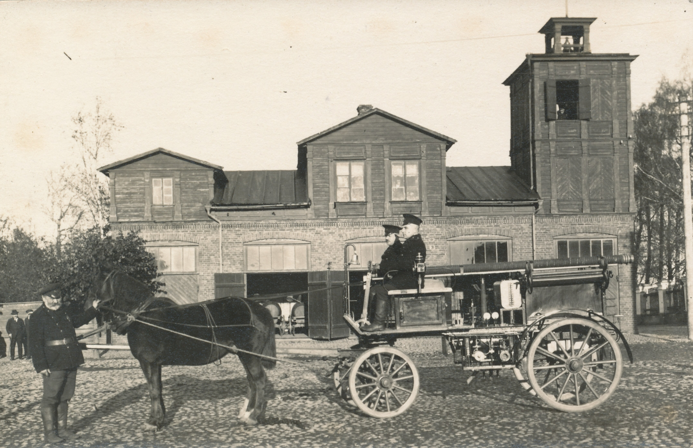 Võru tuletõrje esimene mootoriprits